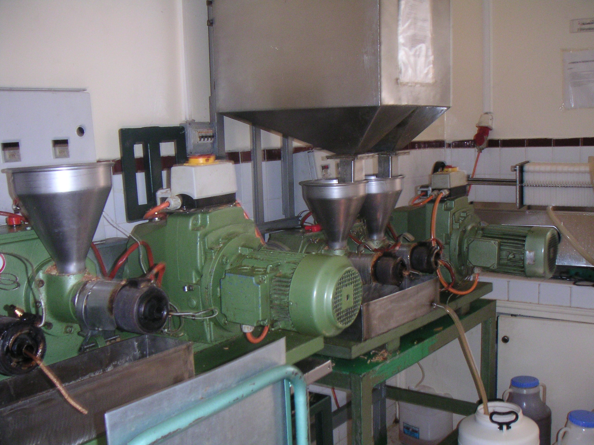 Extraction de l'huile d'argane